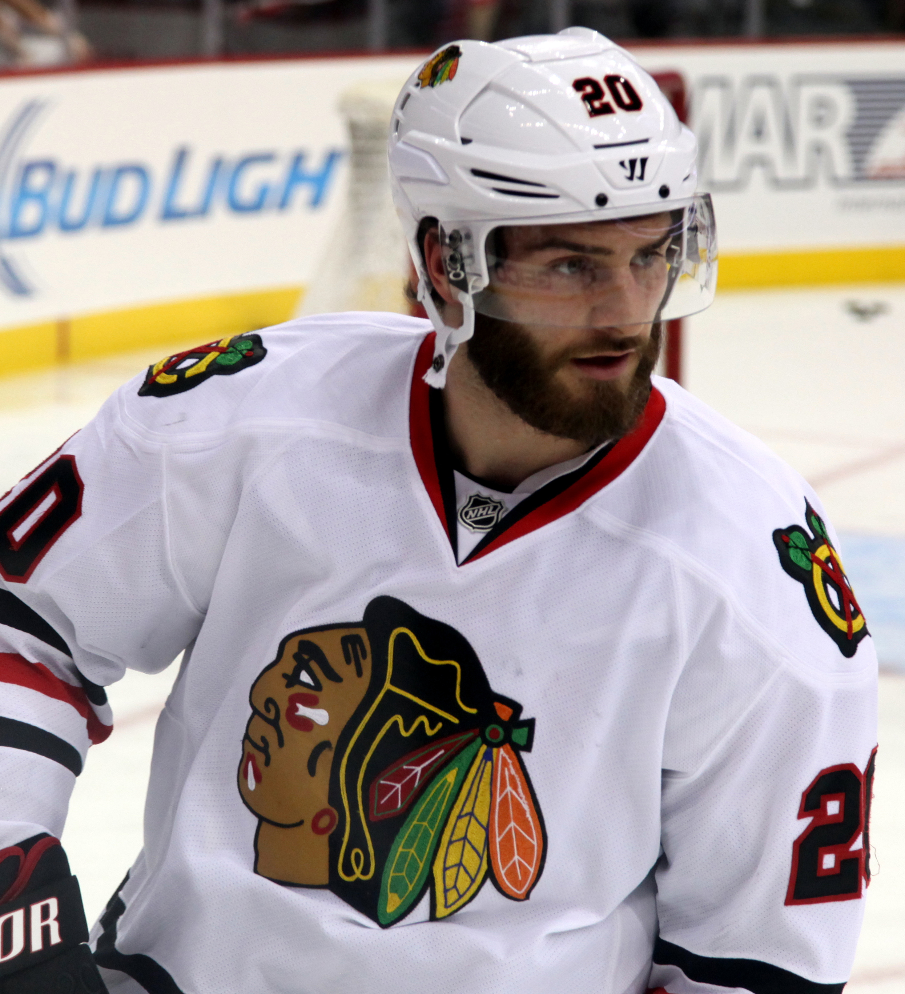 Saad in December 2014.